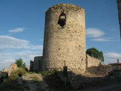 La torre del castell de L'Ametlla de Segarra (Montoliu de Segarra) és d’uns 13 m d’alçada, 2,50 m de diàmetre interior i uns murs de 2,85 m de gruix. Va ser construïda probablement al segle XI.